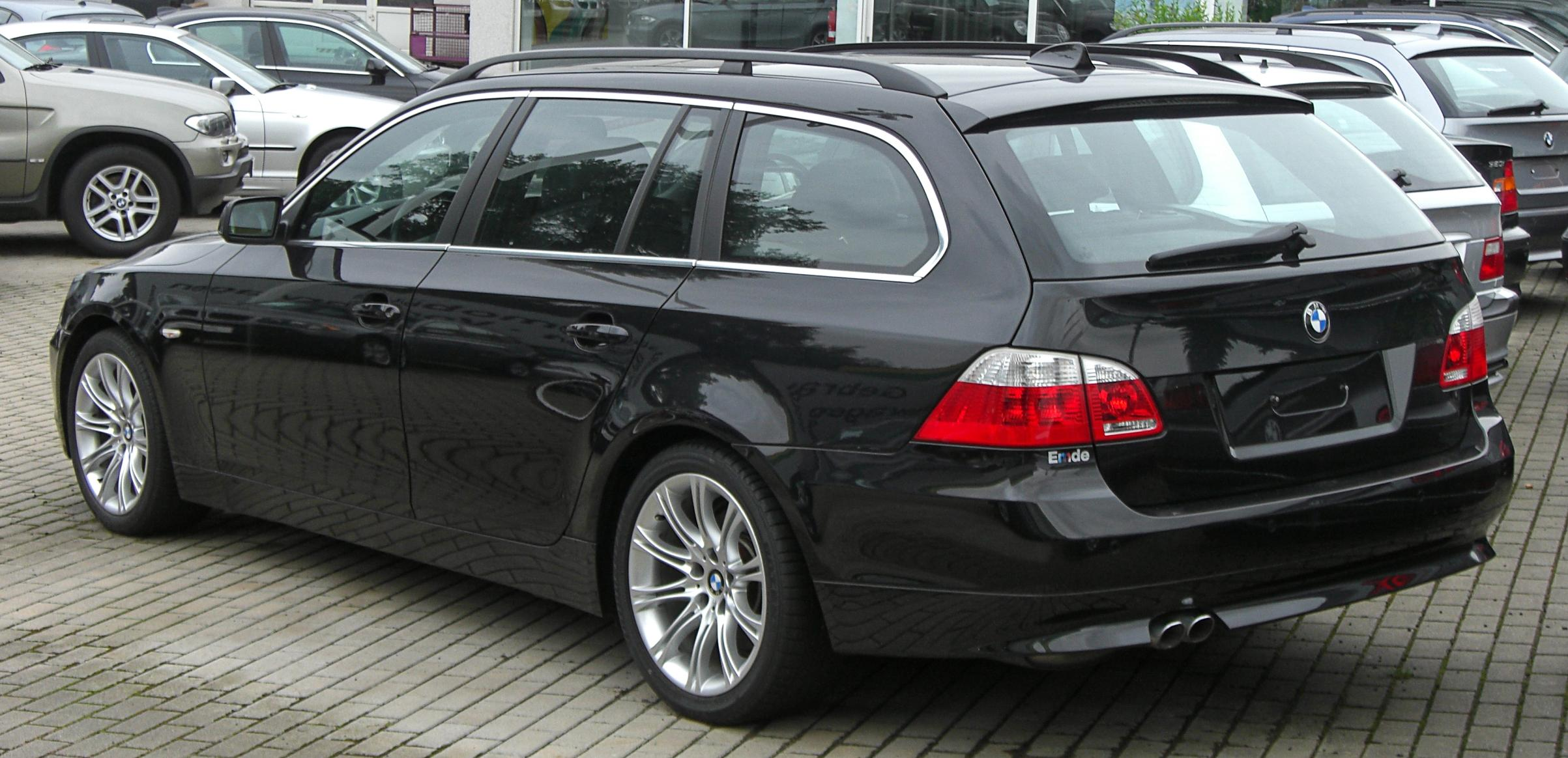 BMW 5er Touring (E60)